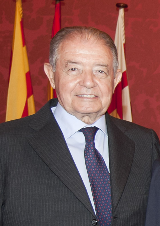 Salvador Gabarró, presidente de Gas Natural, en la entrega del Premio Llotja 2010 a Repsol YPF, 23 de mayo de 2011